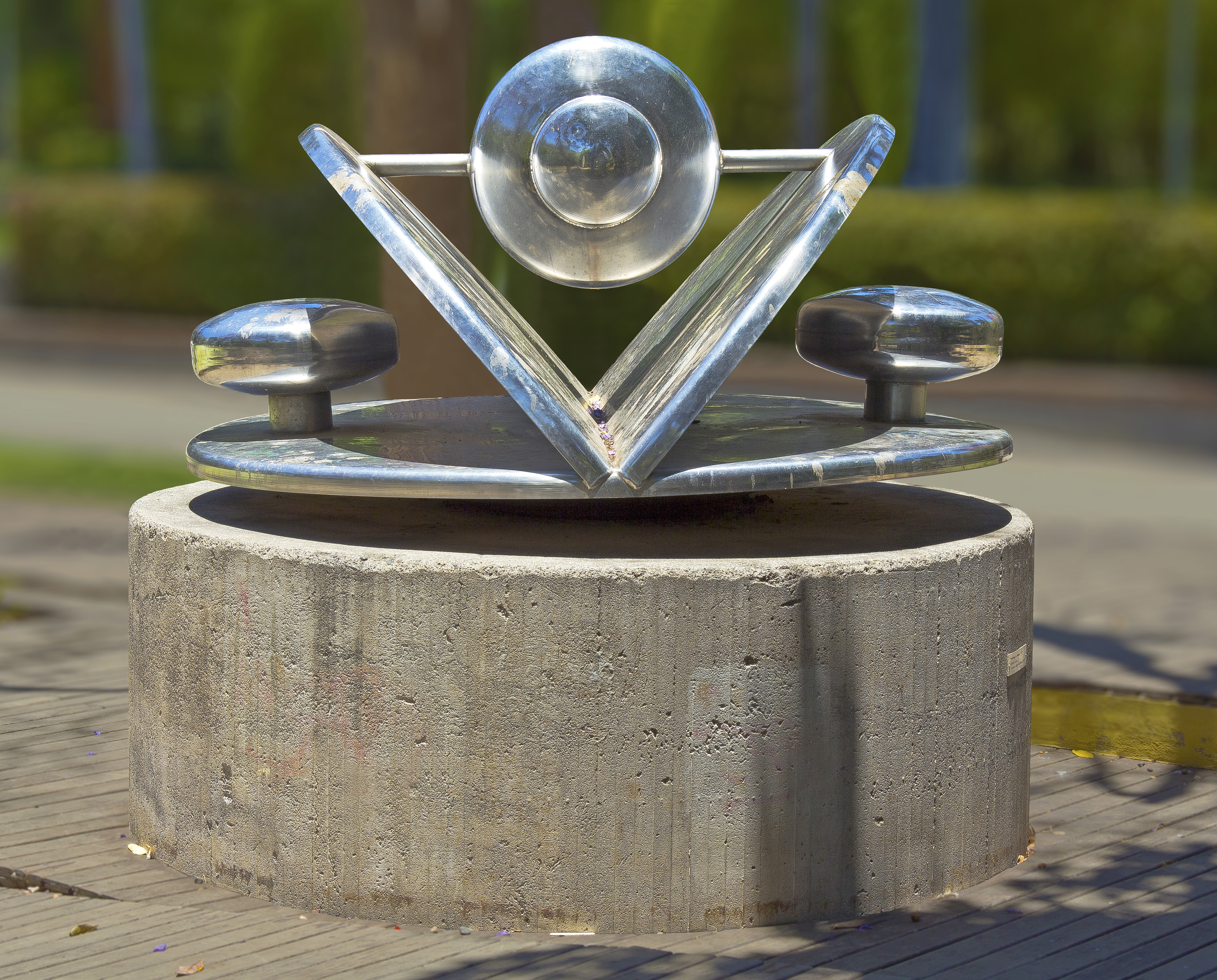 Die Edelstahlplastik „Homenaje a Millares“ des französischen Künstlers Claude Viseux wurde 1973 im Rahmen der Initiative „Escultura en la Calle“ der Architektenkammer der Kanarischen Inseln im Parque García Sanabria in Santa Cruz de Tenerife aufgestellt. Die Plastik hat die Maße 1,22 x 2,00 x 2,00m